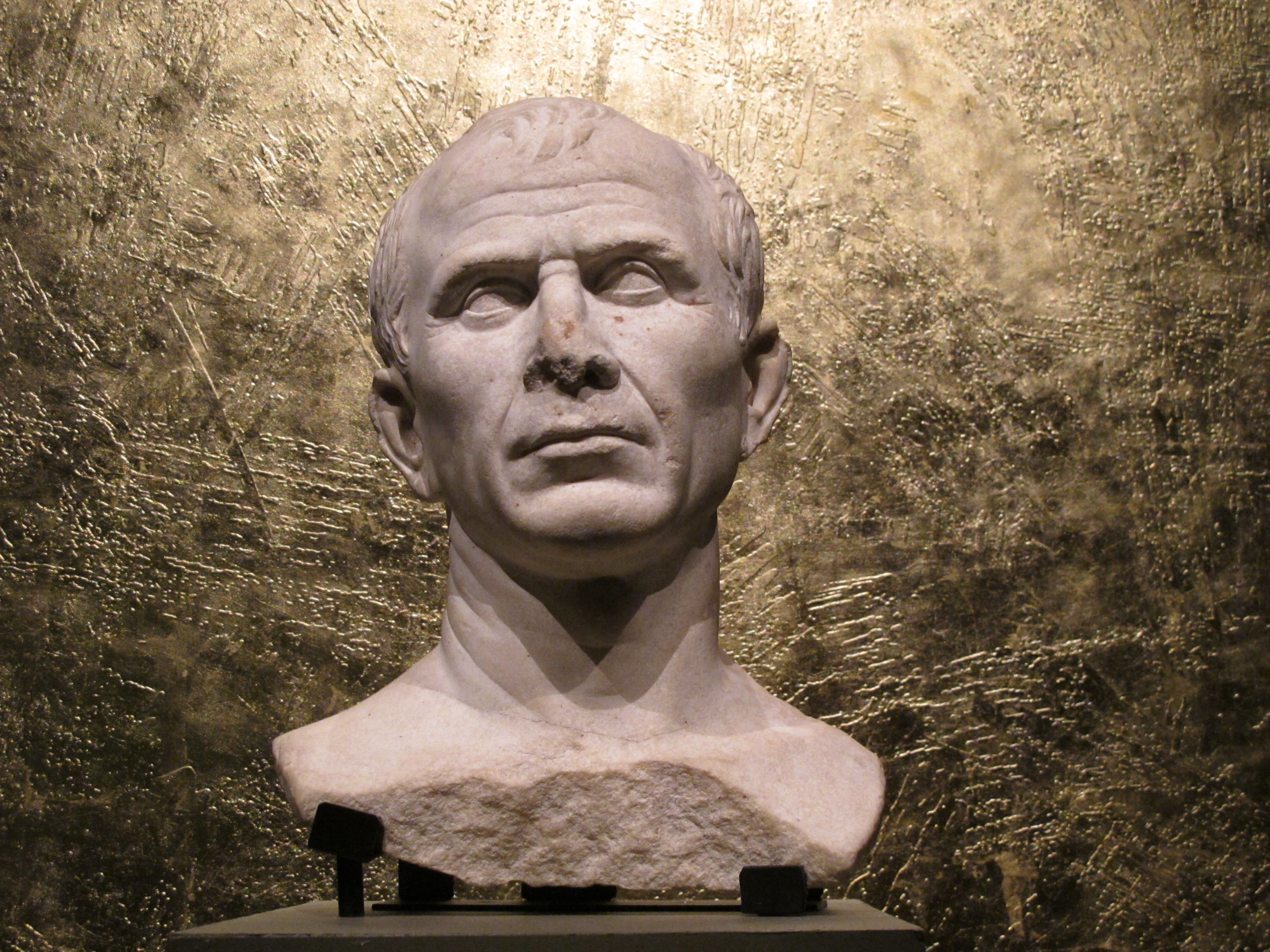 arles 2010